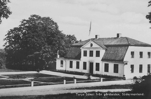 Torps säteri, flygelbyggnad fasad mot gården